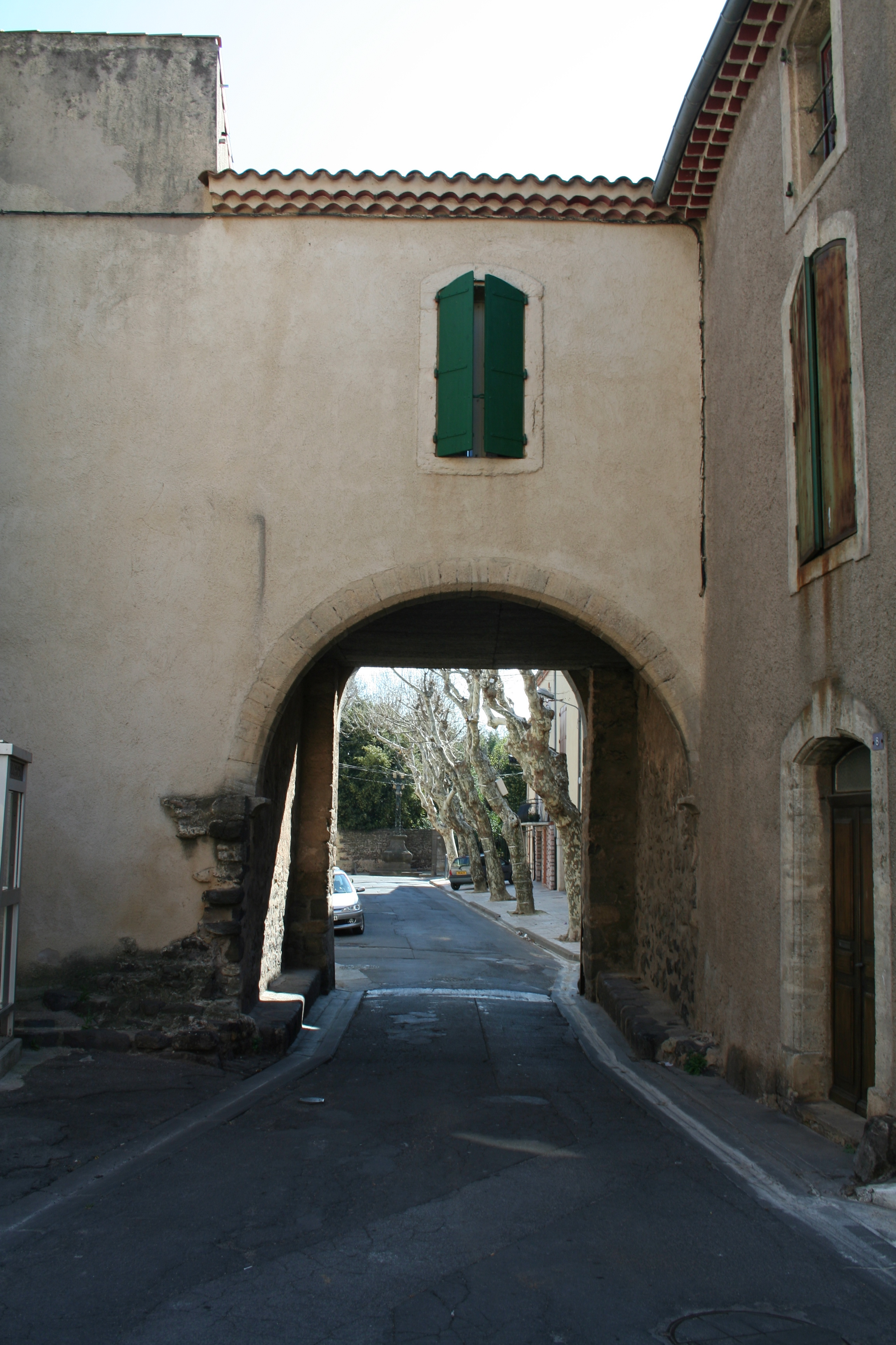 Bessan (Hérault) - ancienne porte du village.